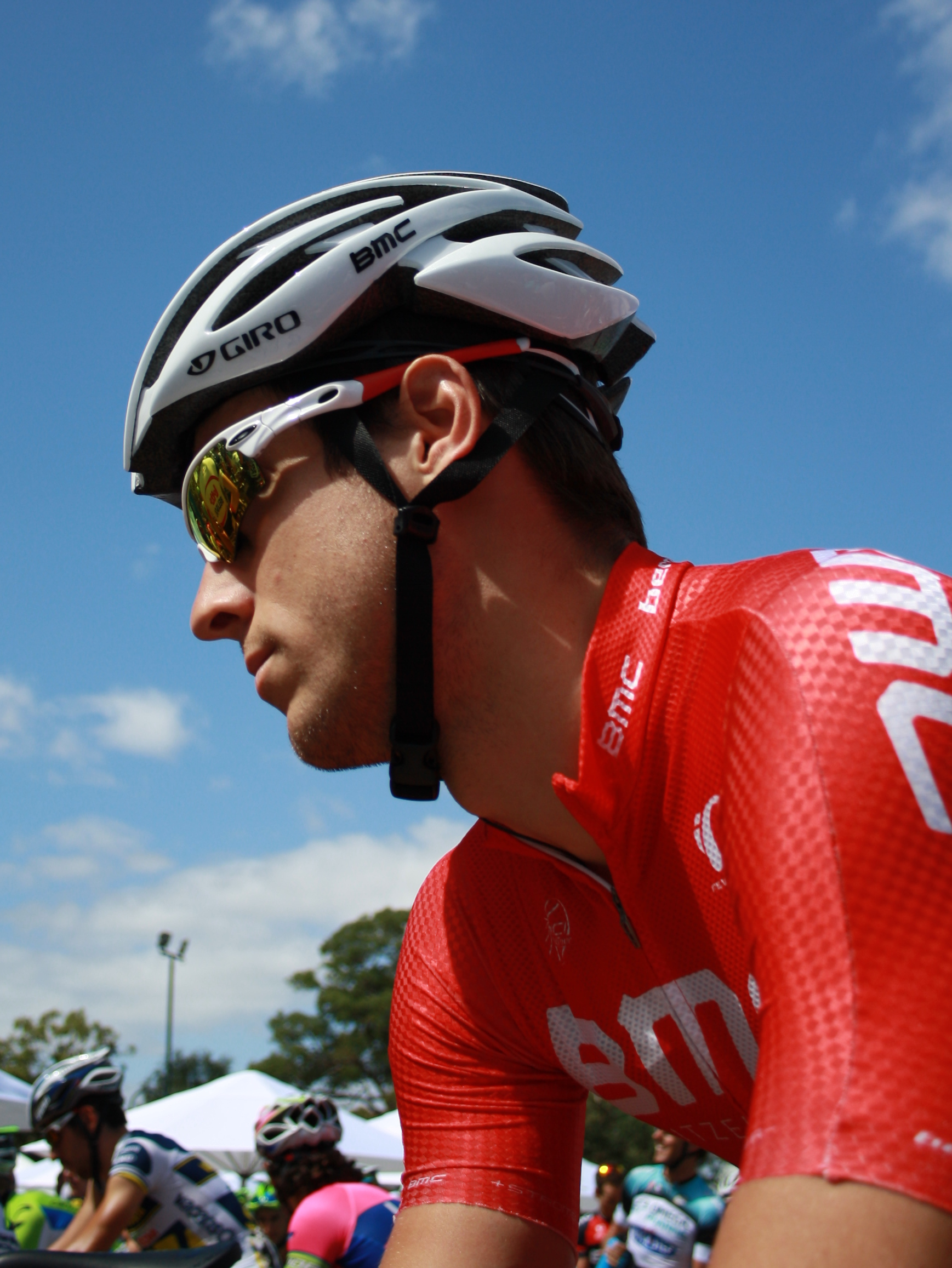 Kohler